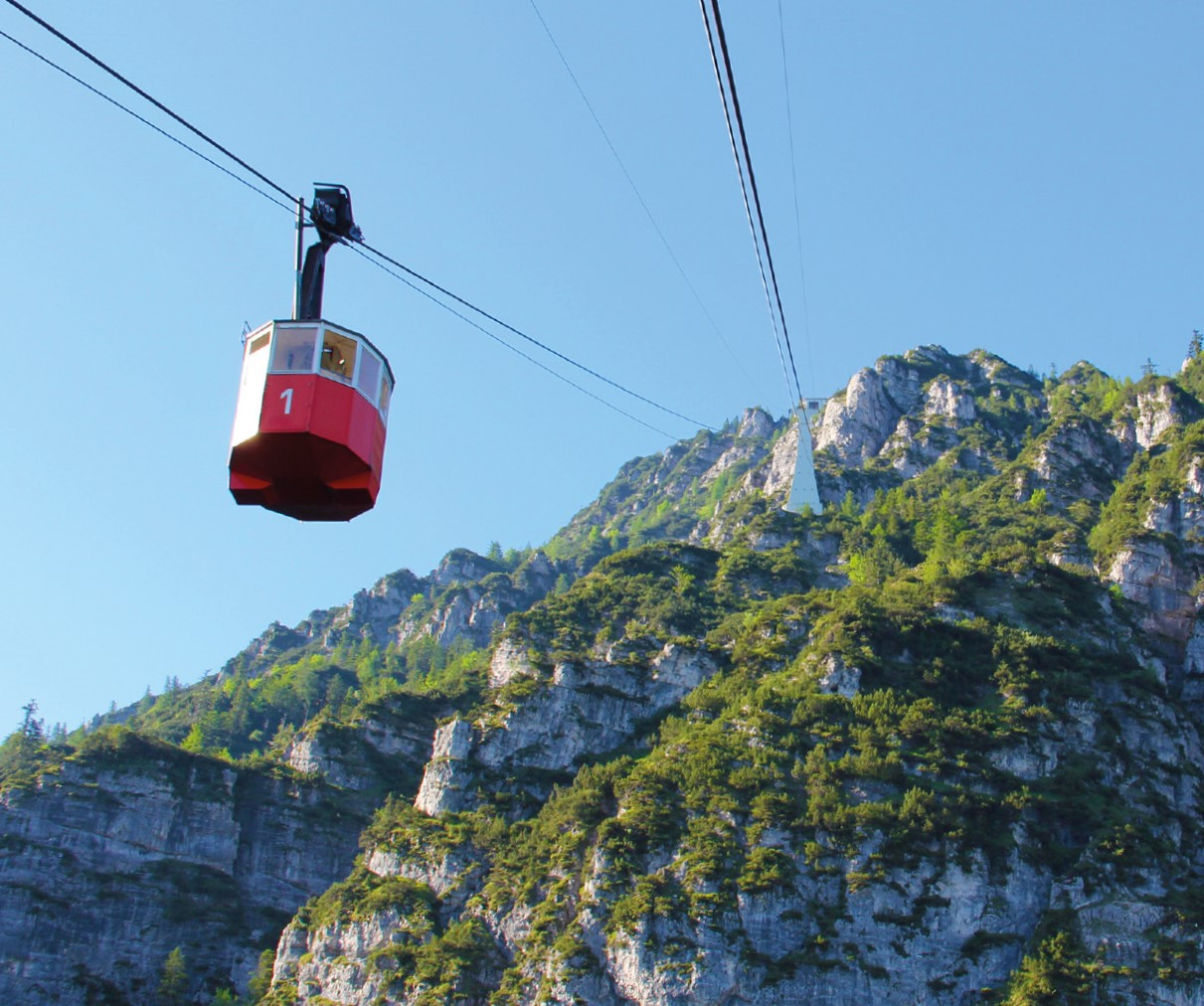 Predigtstuhlbahn Bad Reichenhall (Bayern-Deutschland) Gebaut 1928